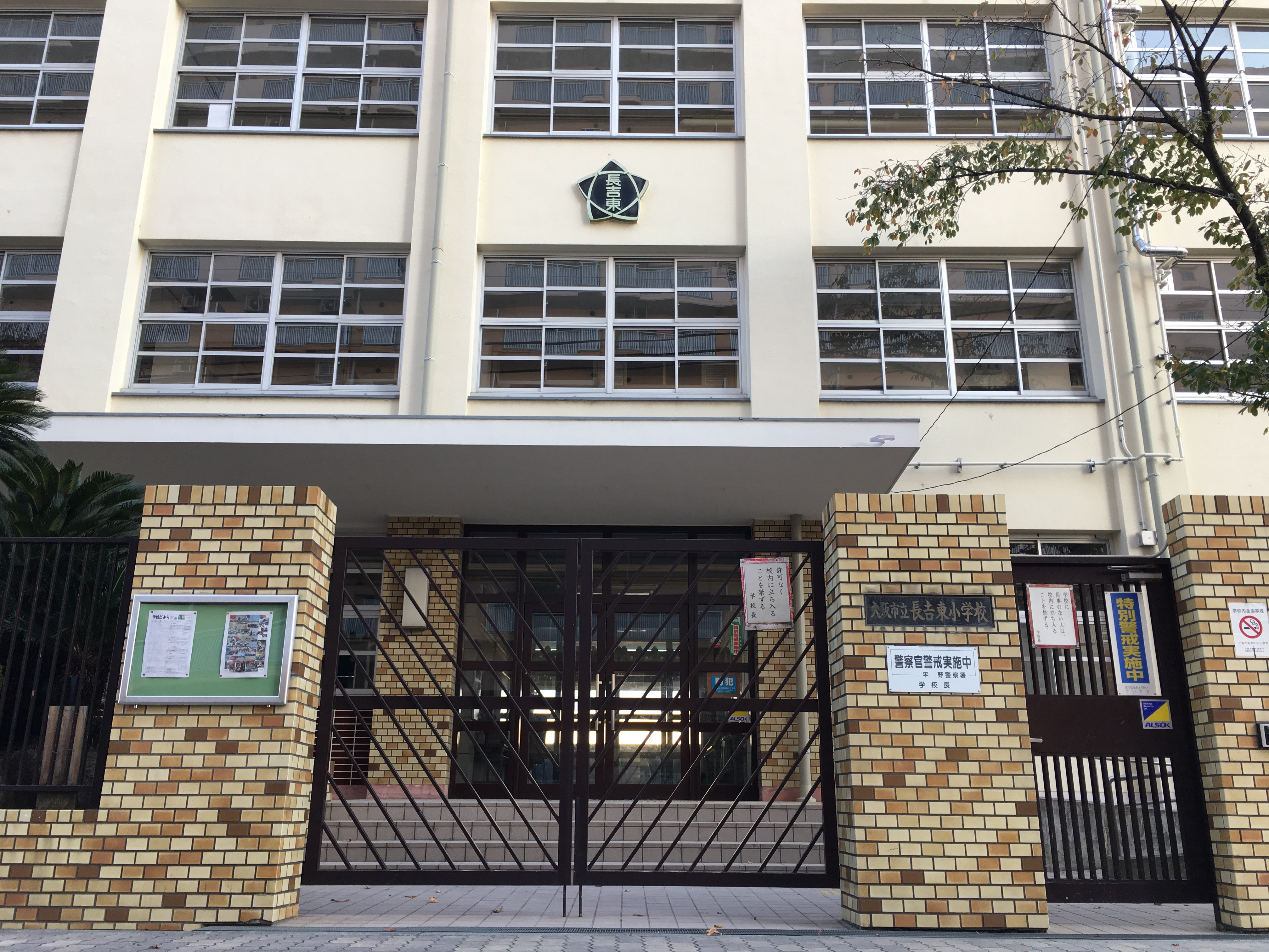 大阪市立長吉東小学校